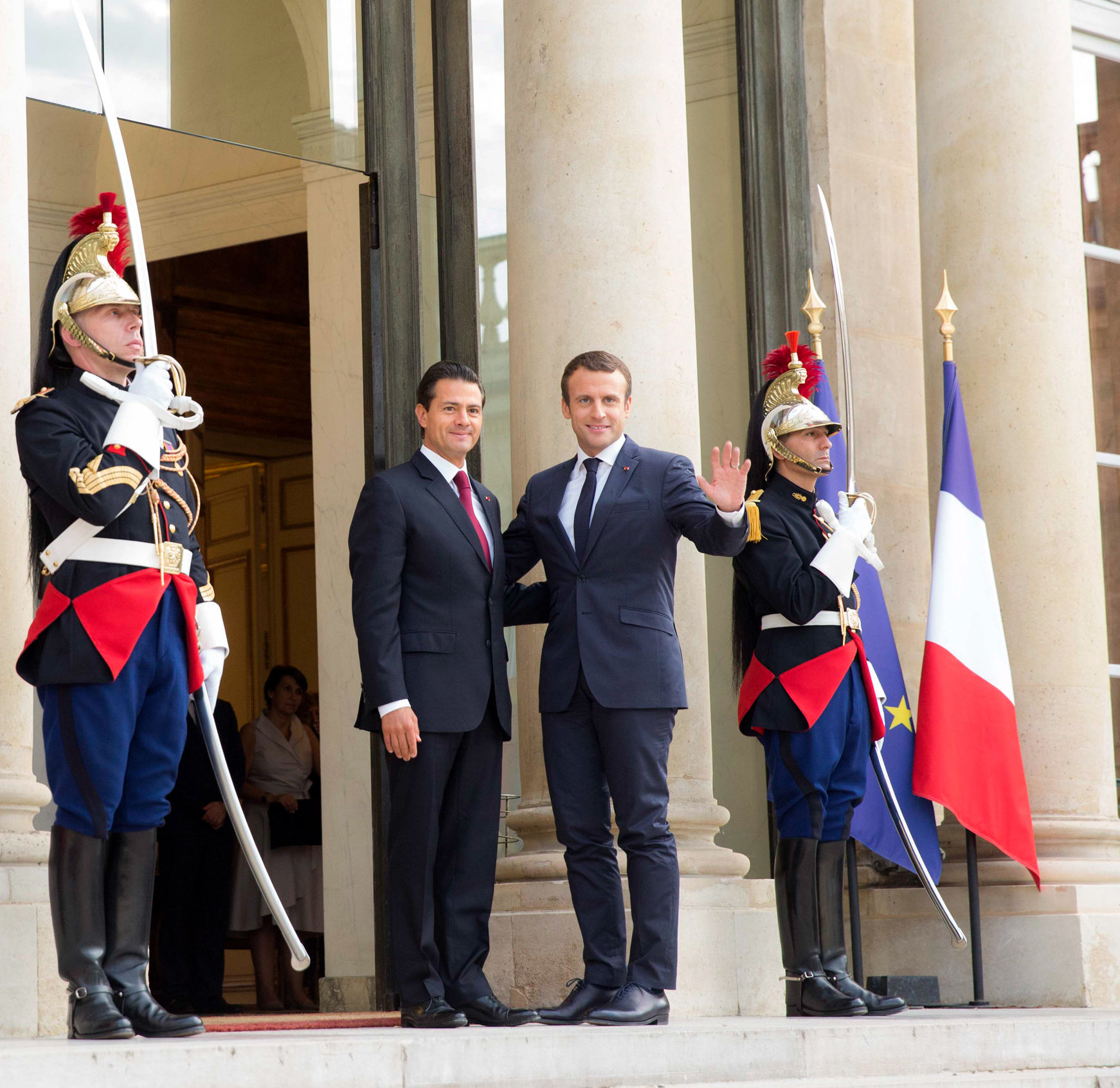 El Presidente Enrique Peña Nieto se encuentra en París, en donde se reunirá con el Presidente Emmanuel Macron, con el objetivo de fortalecer la relación entre México y Francia.